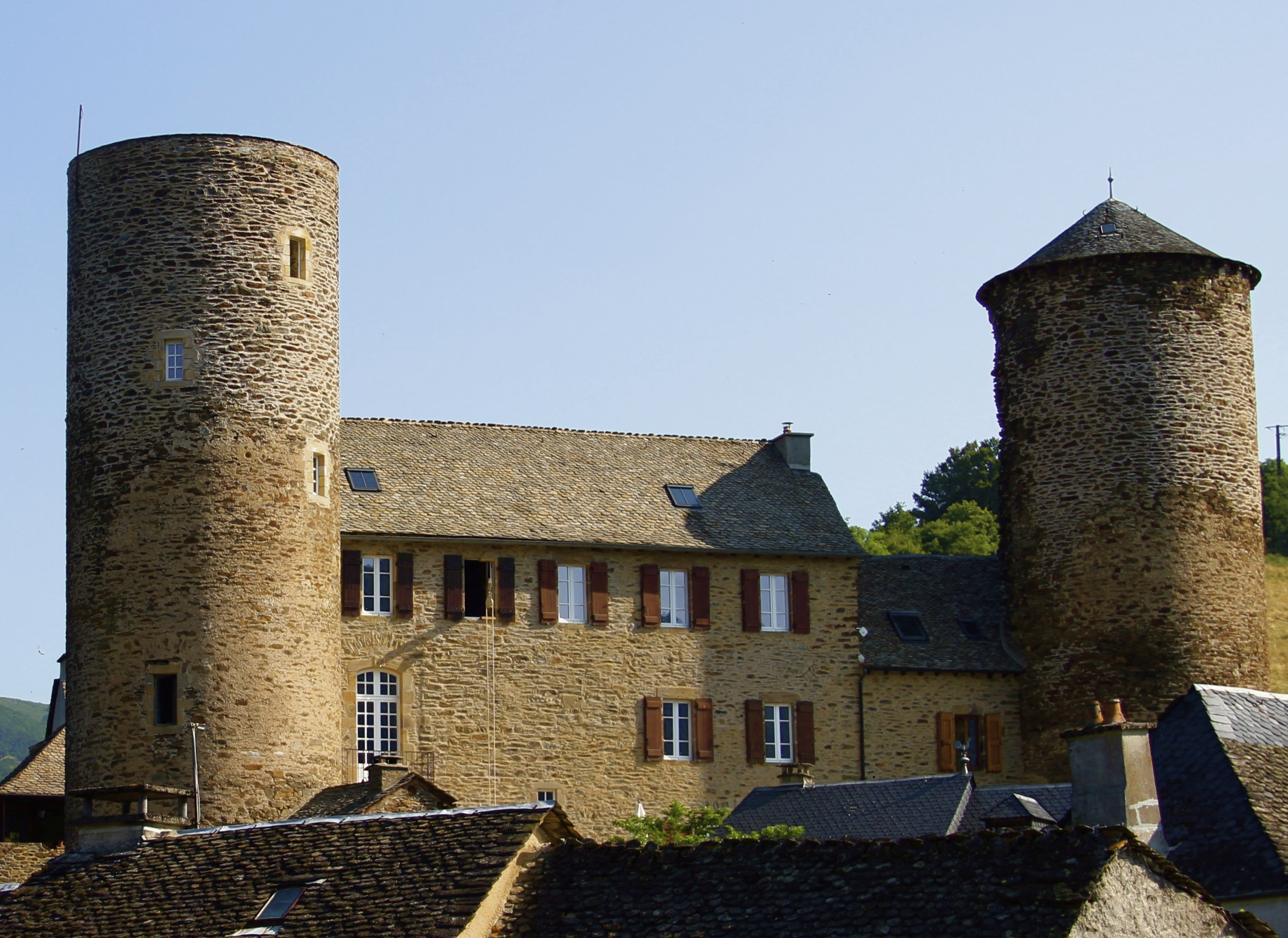 Château de Pomayrols- façade sud (Aveyron-France)